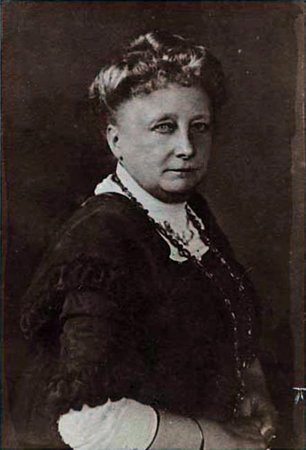 Portret van Anna Abrahams (1849-1930)